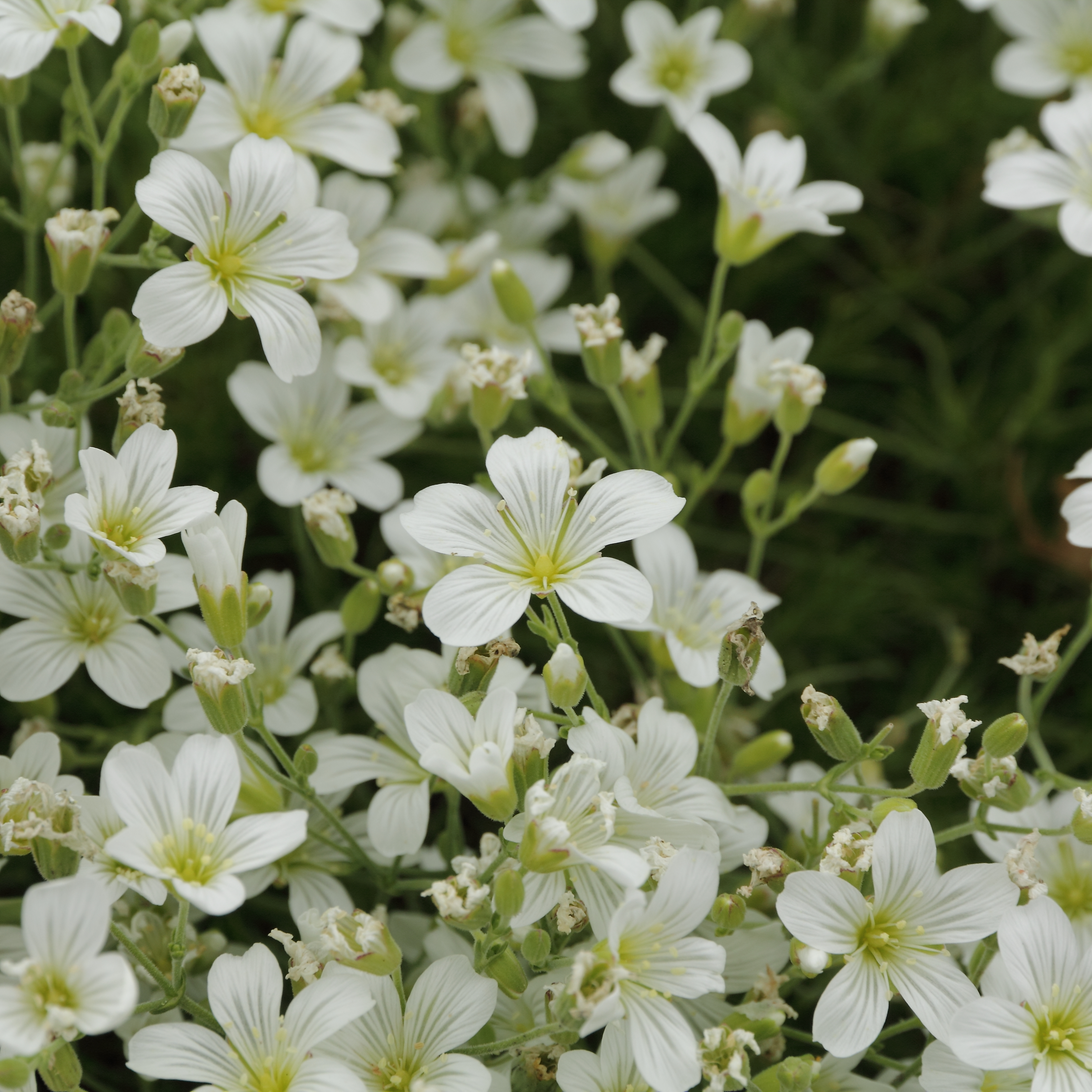 Minuartia laricifolia ssp. kitaibelii i Bergianska trädgården.